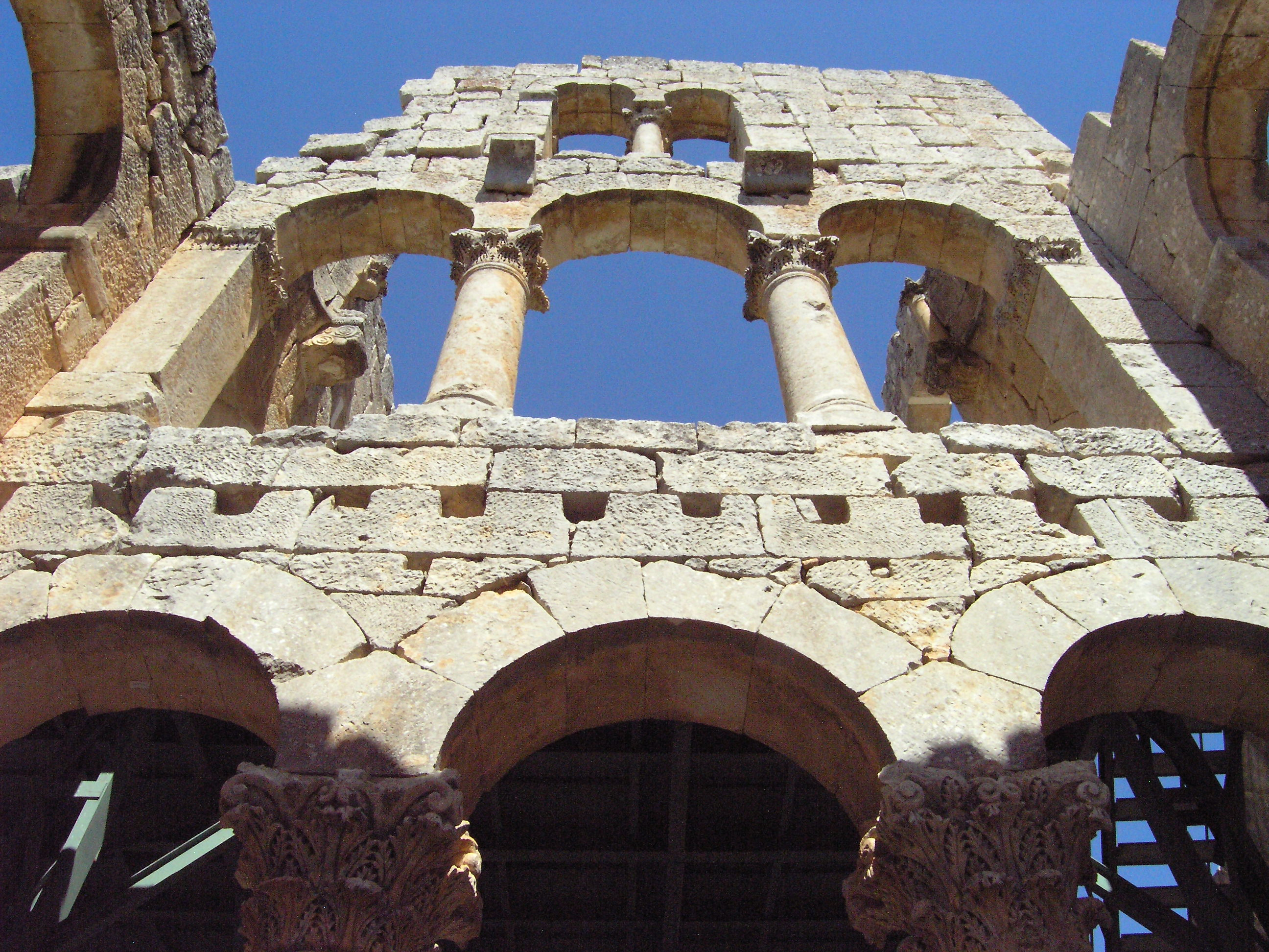 Alahan "Kloster", frühbyzantinische Pilgeranlage in der Türkei (Provinz Mersin), Ostkirche, südliches Seitenschiff